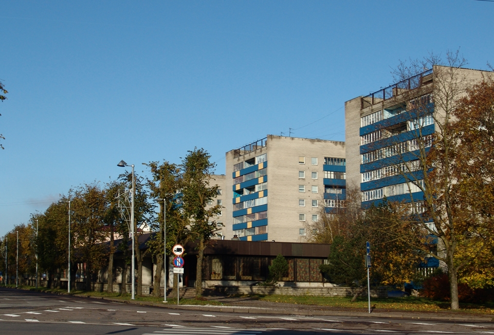 Korterelamud Narvas Puškini tänaval